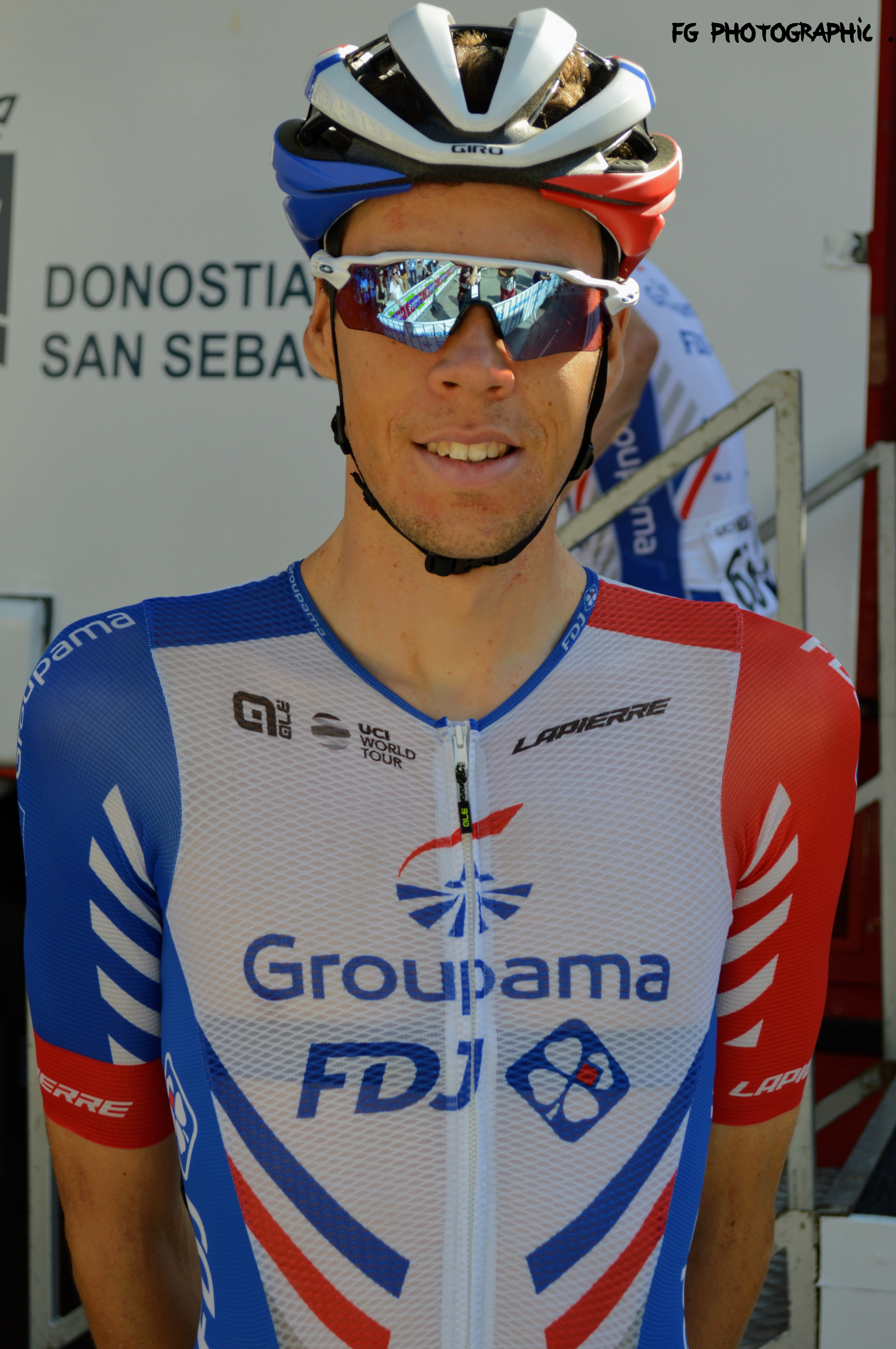 Kevin GENIETS - Août 2019 (Clasica San Sebastian)